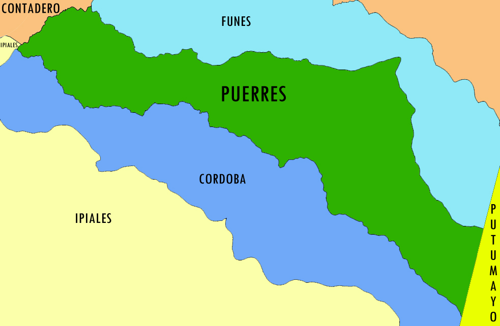 Limites Municipio de Puerres